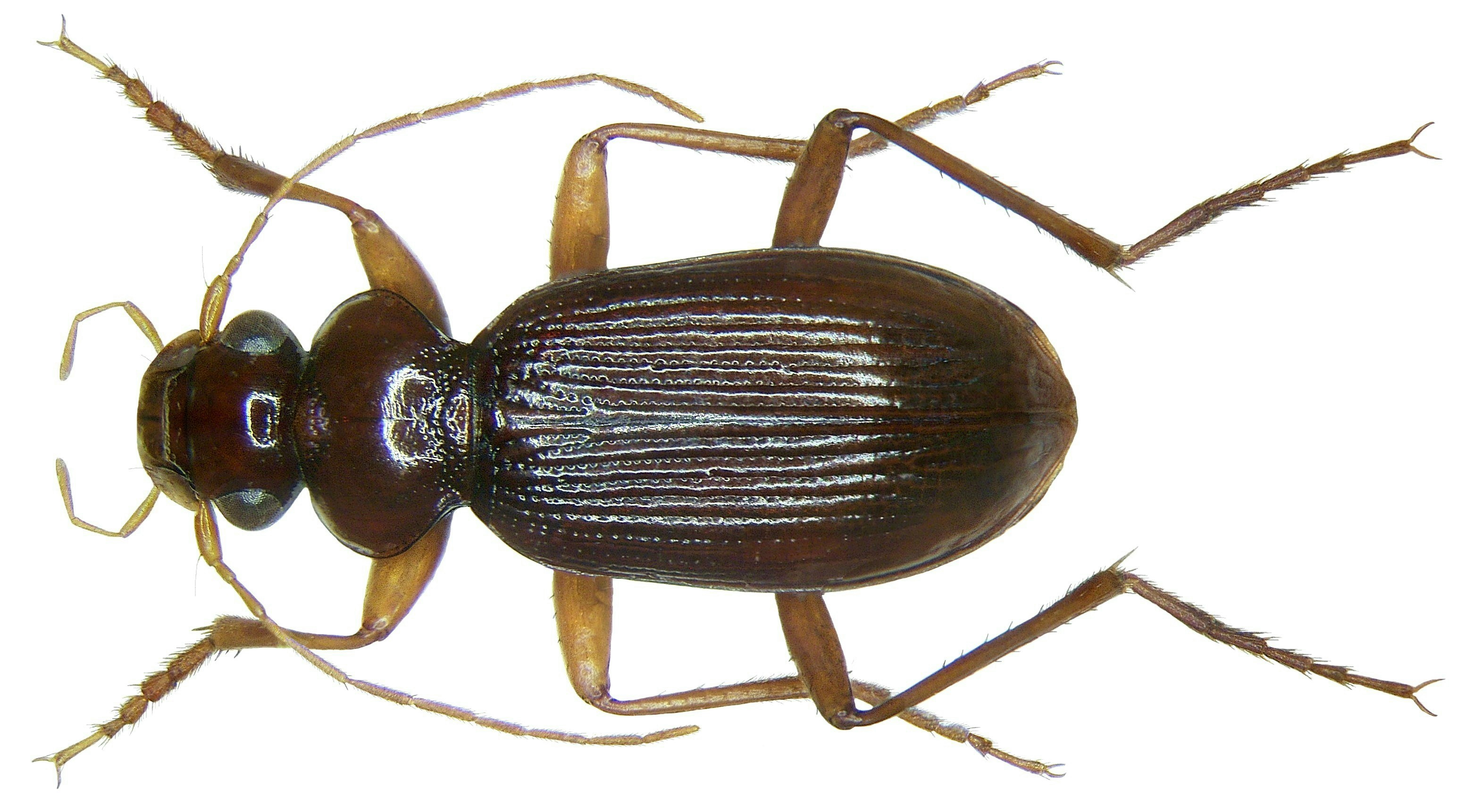 Familie: Carabidae Grösse: 5,7-8,2 mm Verbreitung: Europa bis Mittelasien Fundort: Germania, Oberfranken, Kulmbach leg.det. U.Schmidt, 1983 Foto: U.Schmidt, 2008